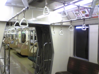 南北線5000形第2編成 吊革の様子